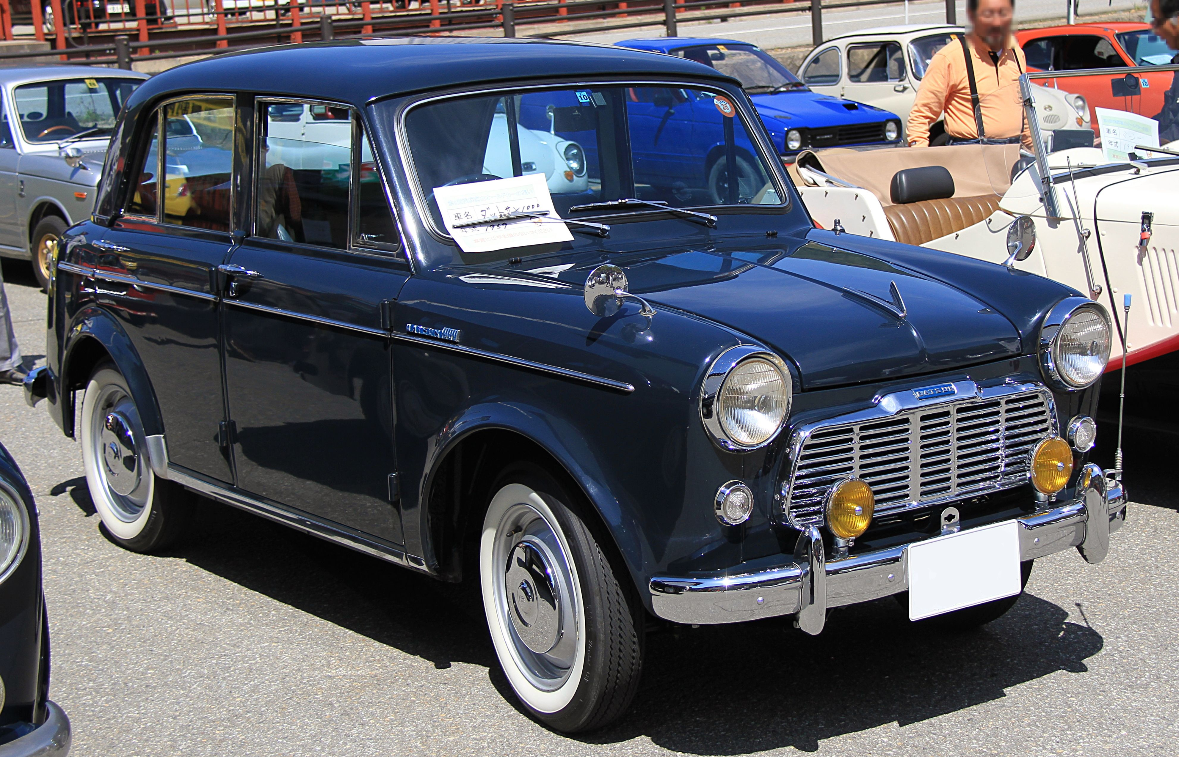 Datsun 211